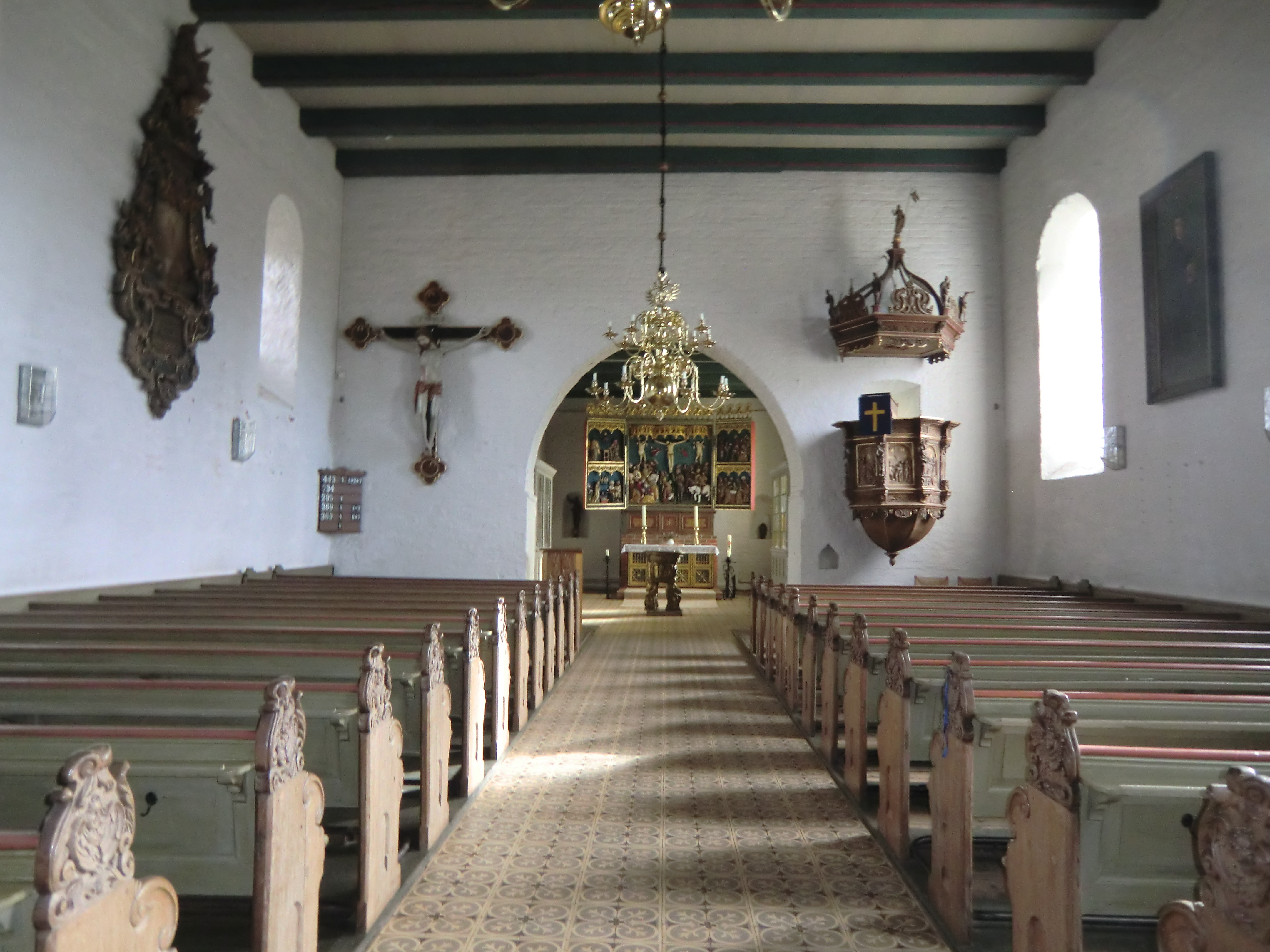 Kirchenschiff